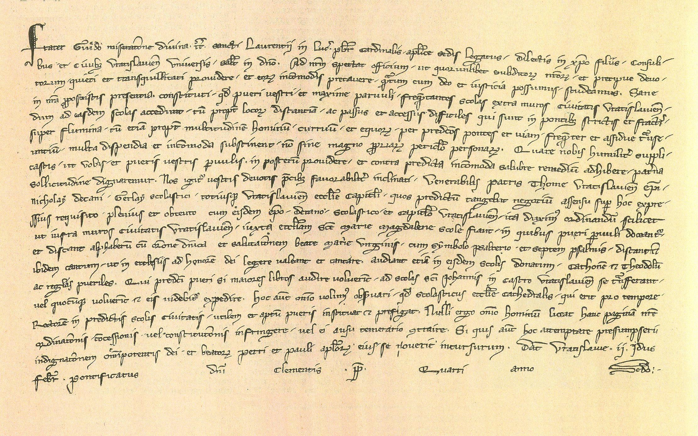 Gründungsurkunde des Maria-Magdalenen-Gymnasiums Breslau von Kardinal Guido